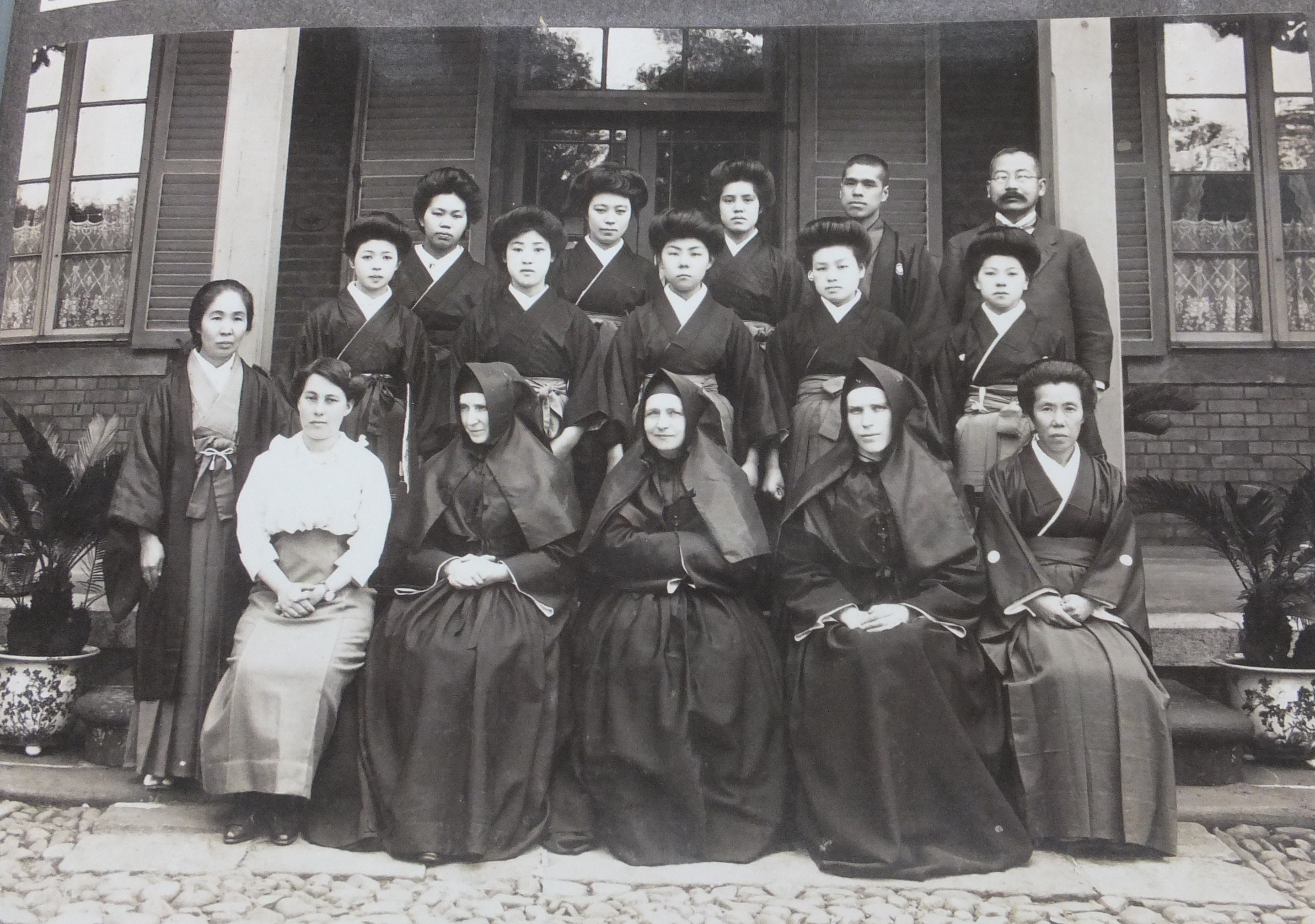 大河平徳教師時代 紅蘭女学校（現横浜雙葉学園）大正5年頃